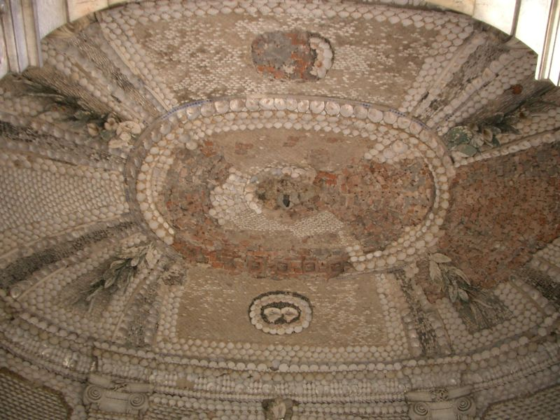 Schlechter Zustand...